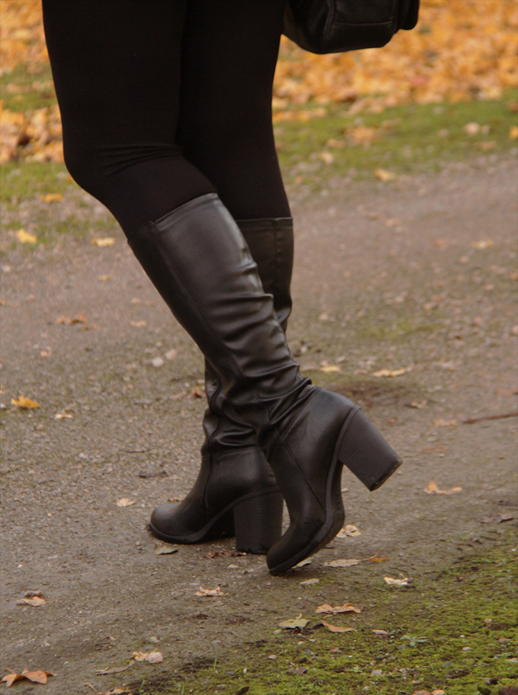 Bottes à talons hauts pour homme